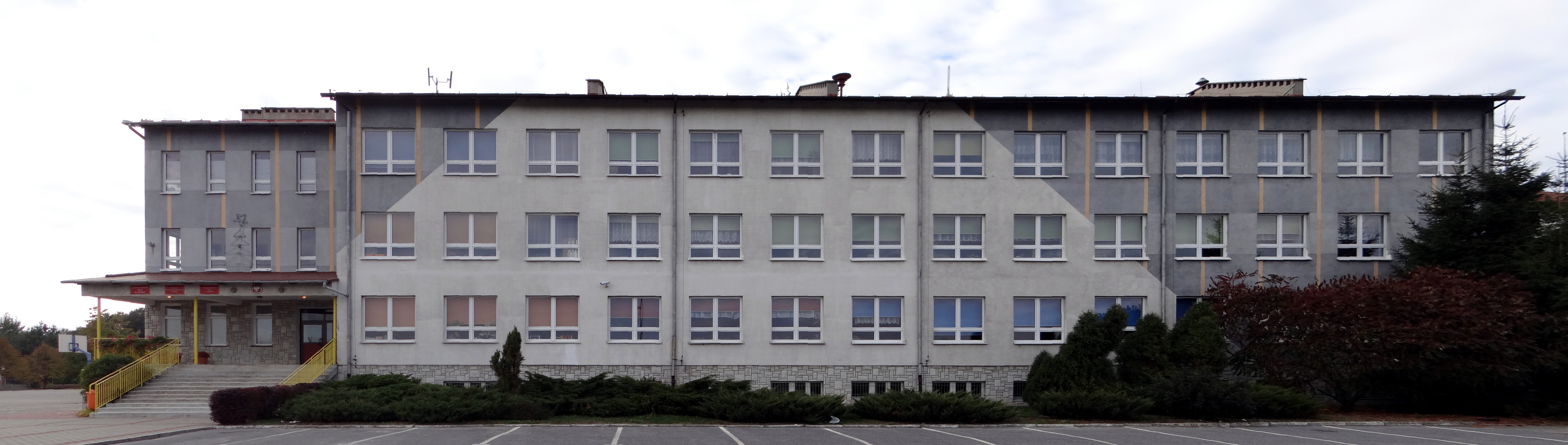 Nisko - Zespół Szkół nr 3 - budynek - panorama